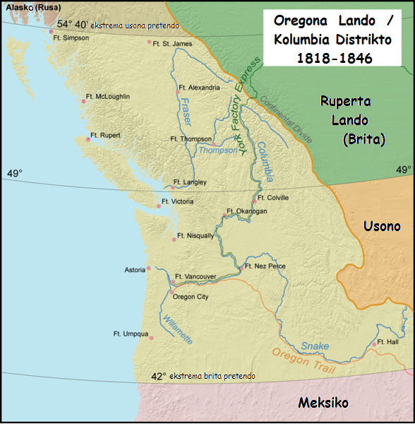 mapo pri la Kolumbia Distrikto = Oregona Lando